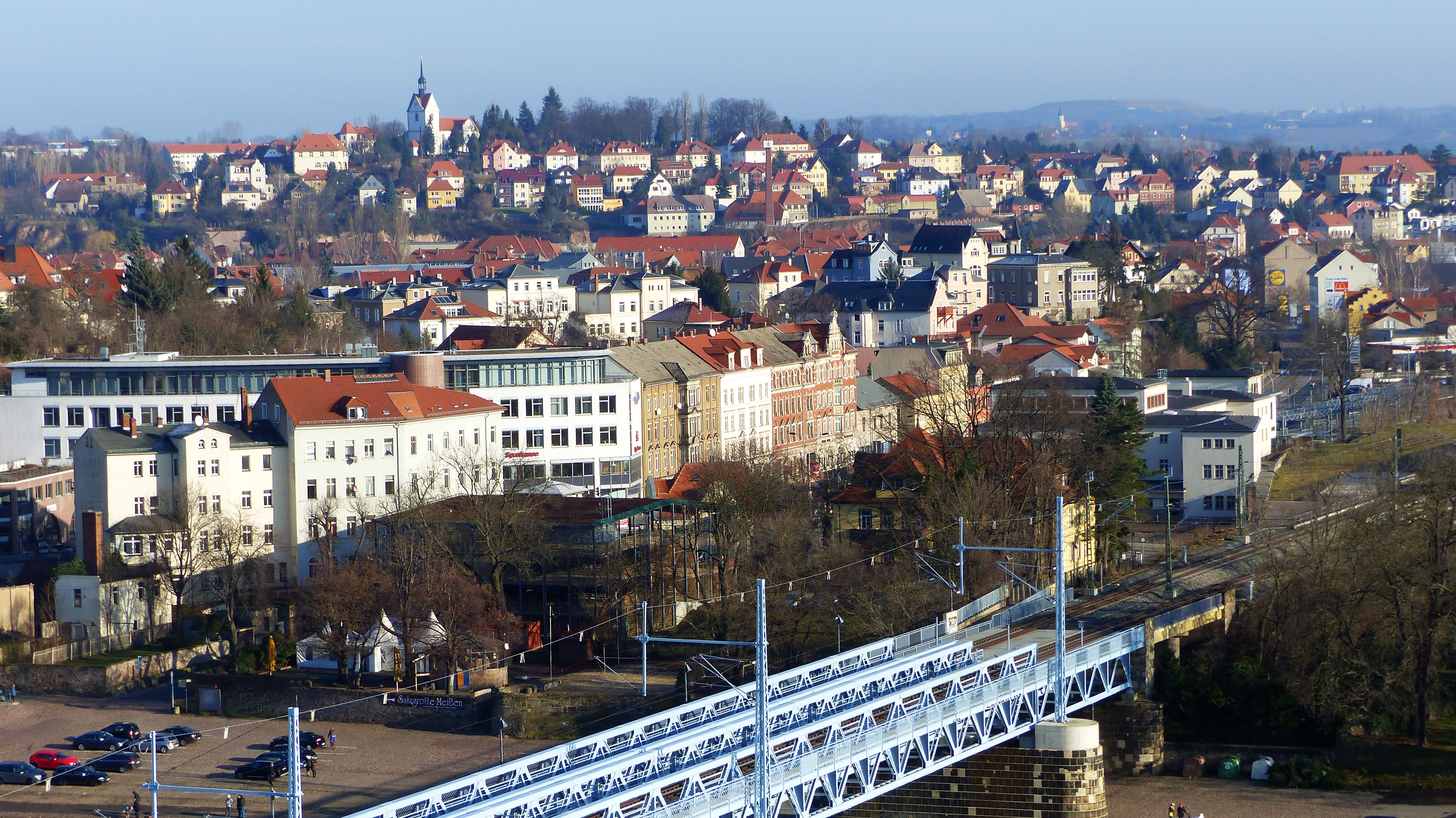 Blick auf den Stadtteil Vorbrücke, Meissen; dahinter Zscheila